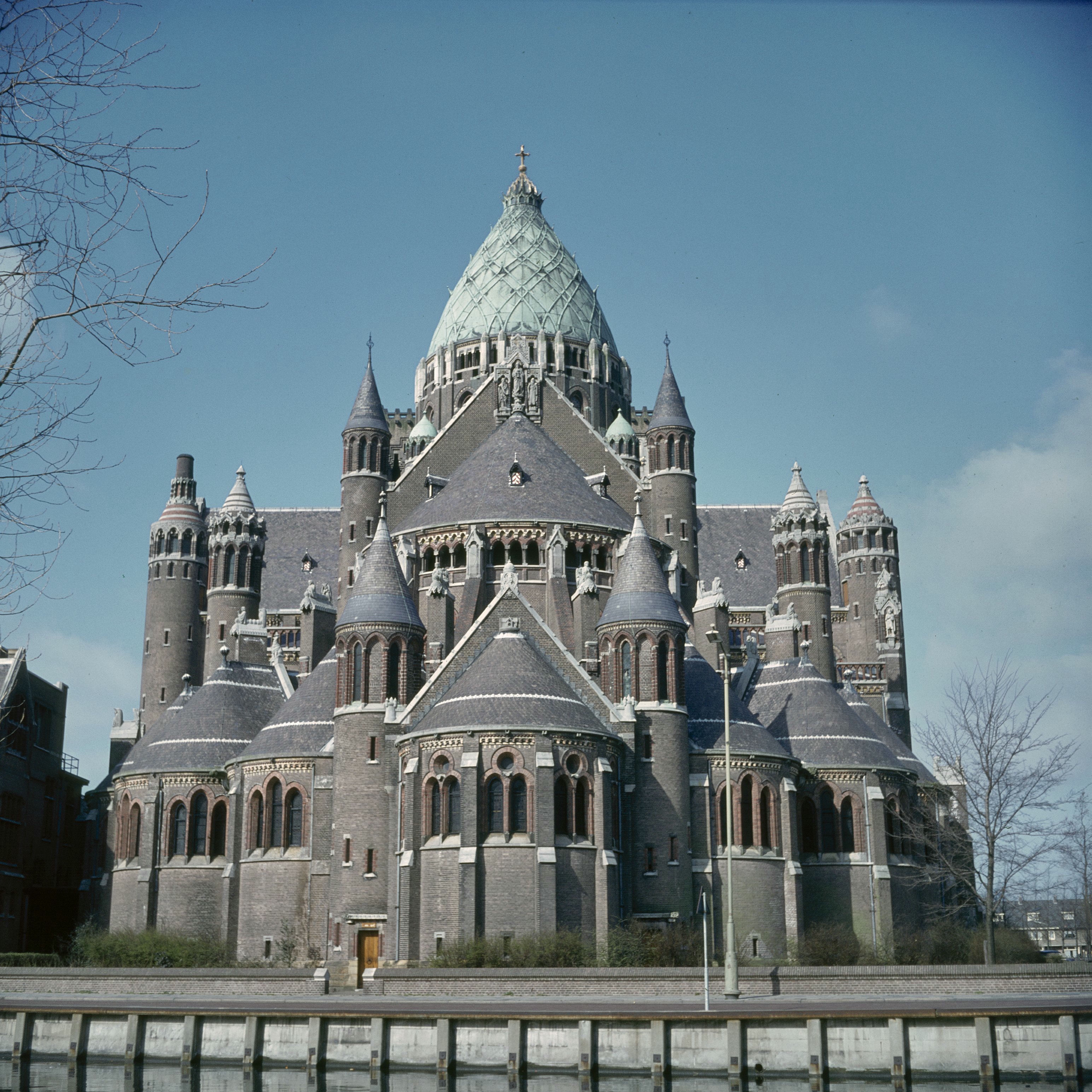 Sint Bavo: Overzicht (opmerking: Gefotografeerd voor: De 19de-eeuwse kerkelijke bouwkunst in Nederland, drs. H.P.R. Rosenburg)